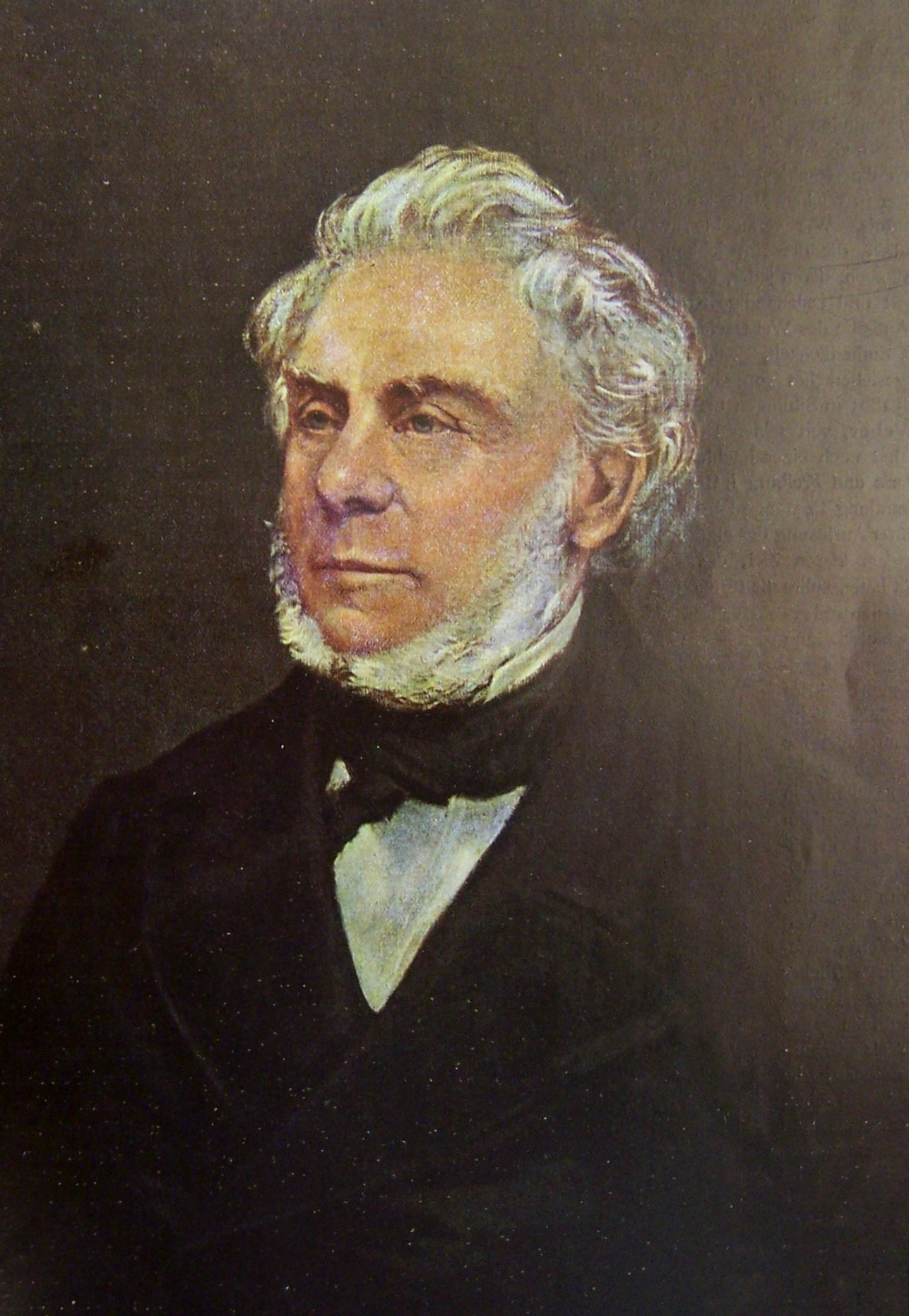 Johann Jakob Weber